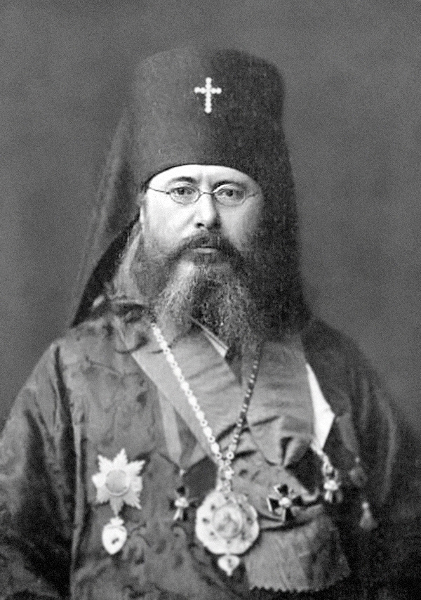 Епископ Никон (Софийски1)